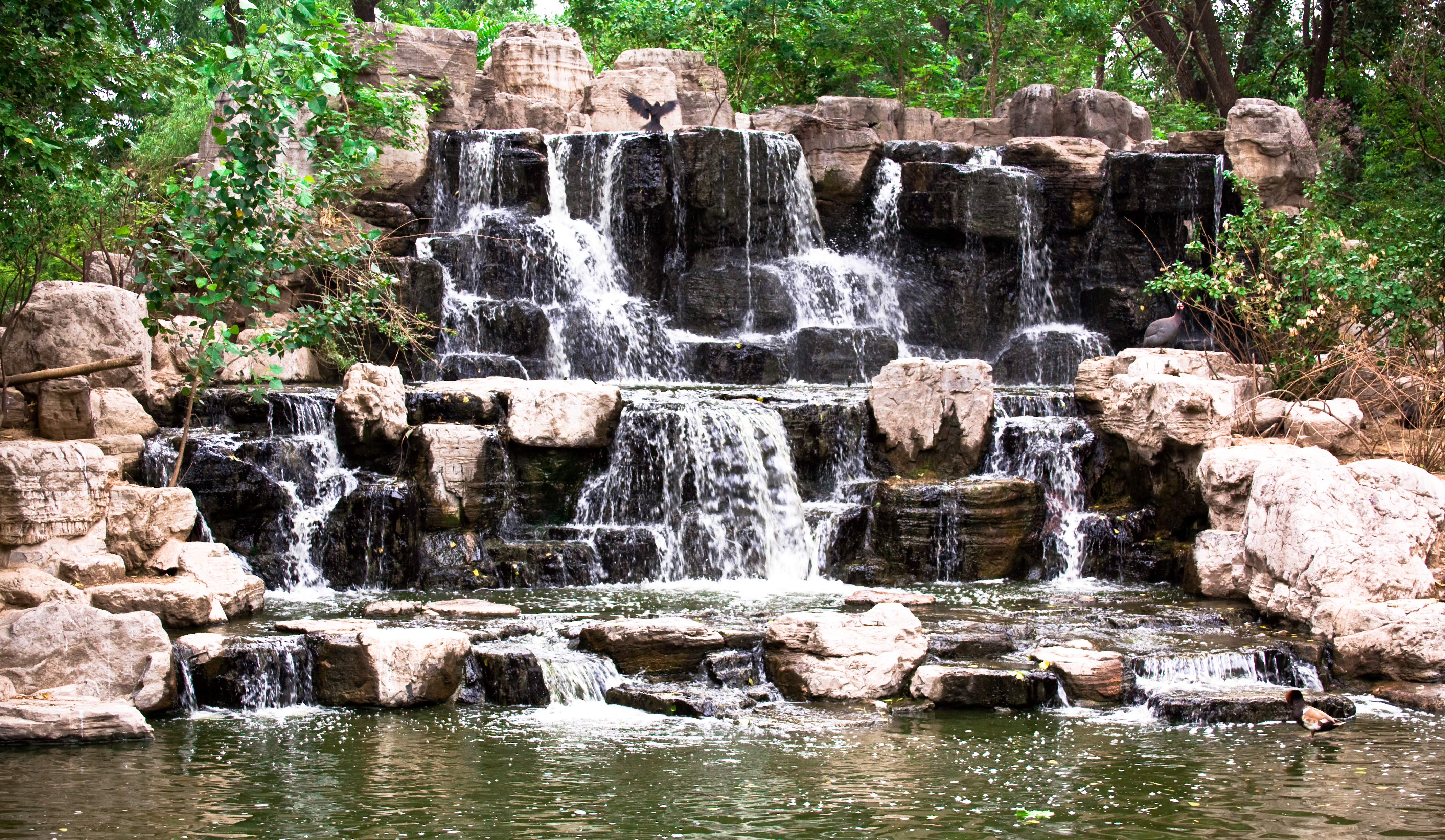 Beijing Zoo Waterfalls